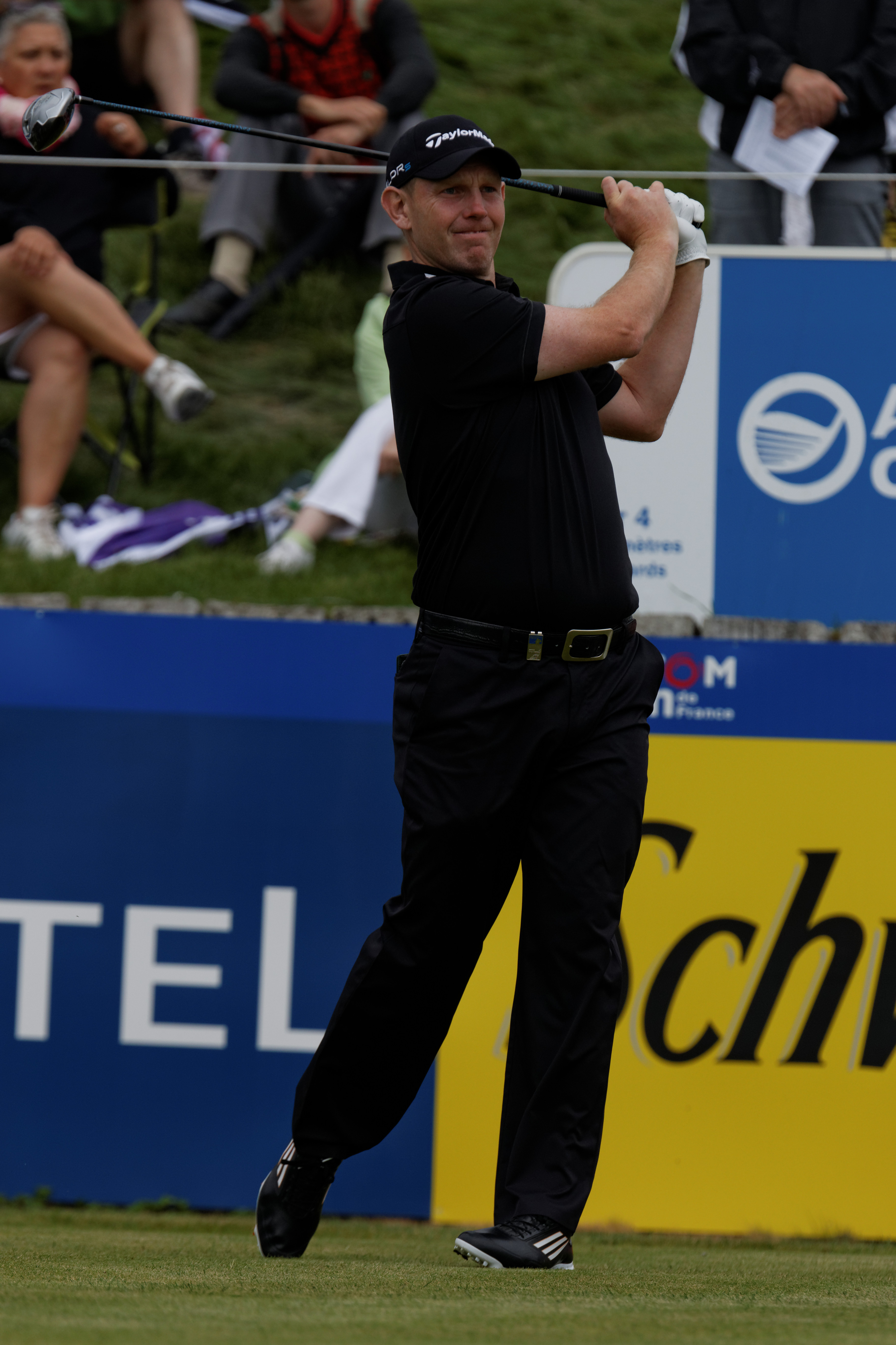 Stephen Gallacher lors du second tour de l'Open de France 2014 - Golf National - Saint-Quentin-en-Yvelines (78) - départ du trou n° 1